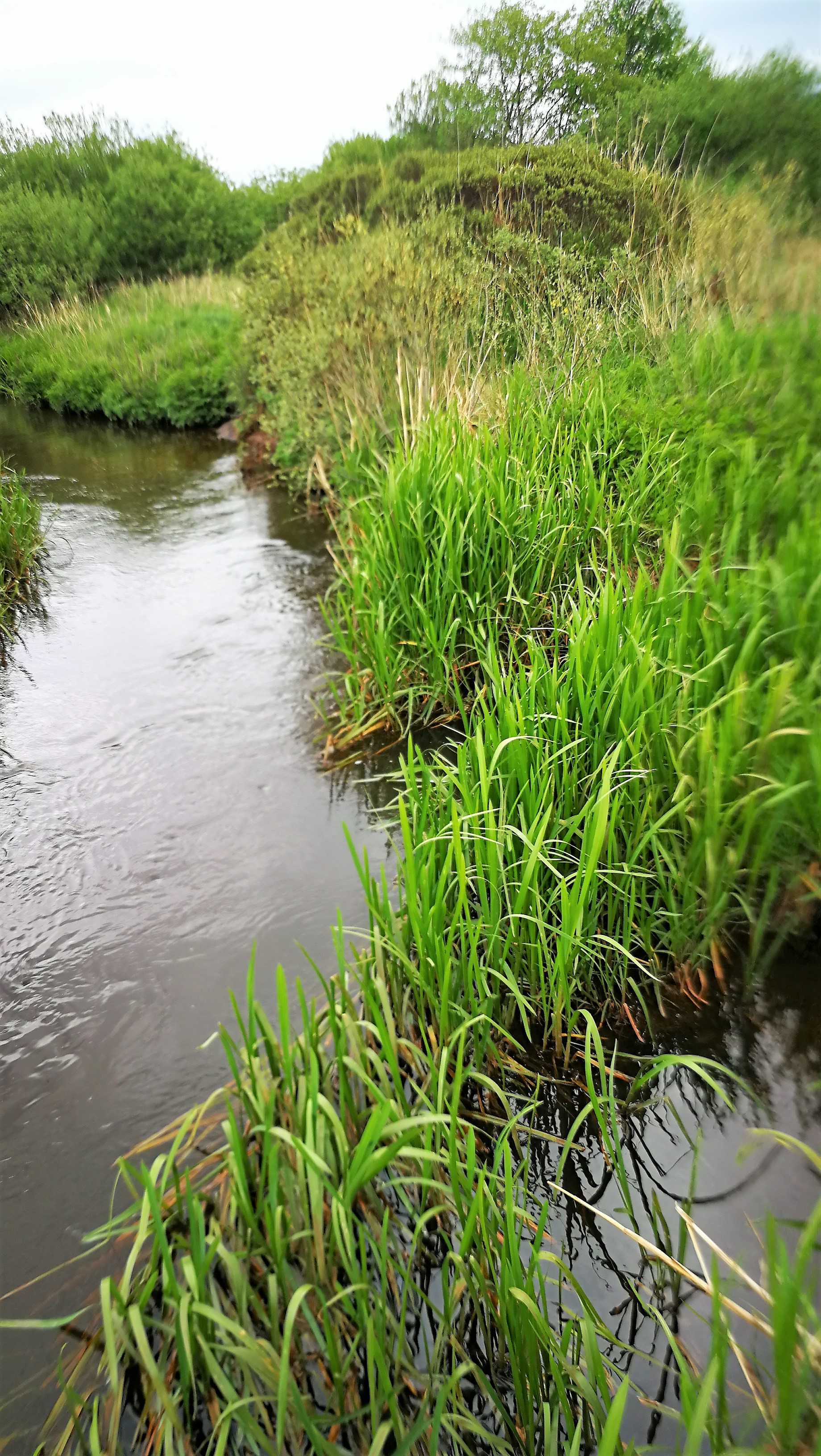 Bording Ås sammenløb med Skygge Å danner her Karup Å